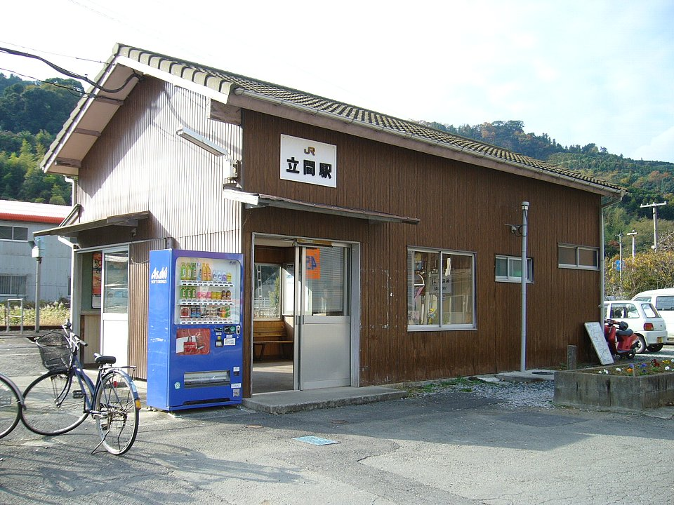 予讃線立間駅